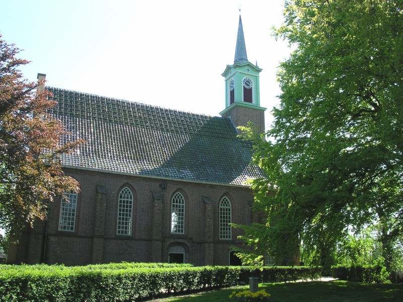 De Hervormde Kerk in Sijbekarspel The Hervomde Kerk, reformed church in the village of Sijbekarspel